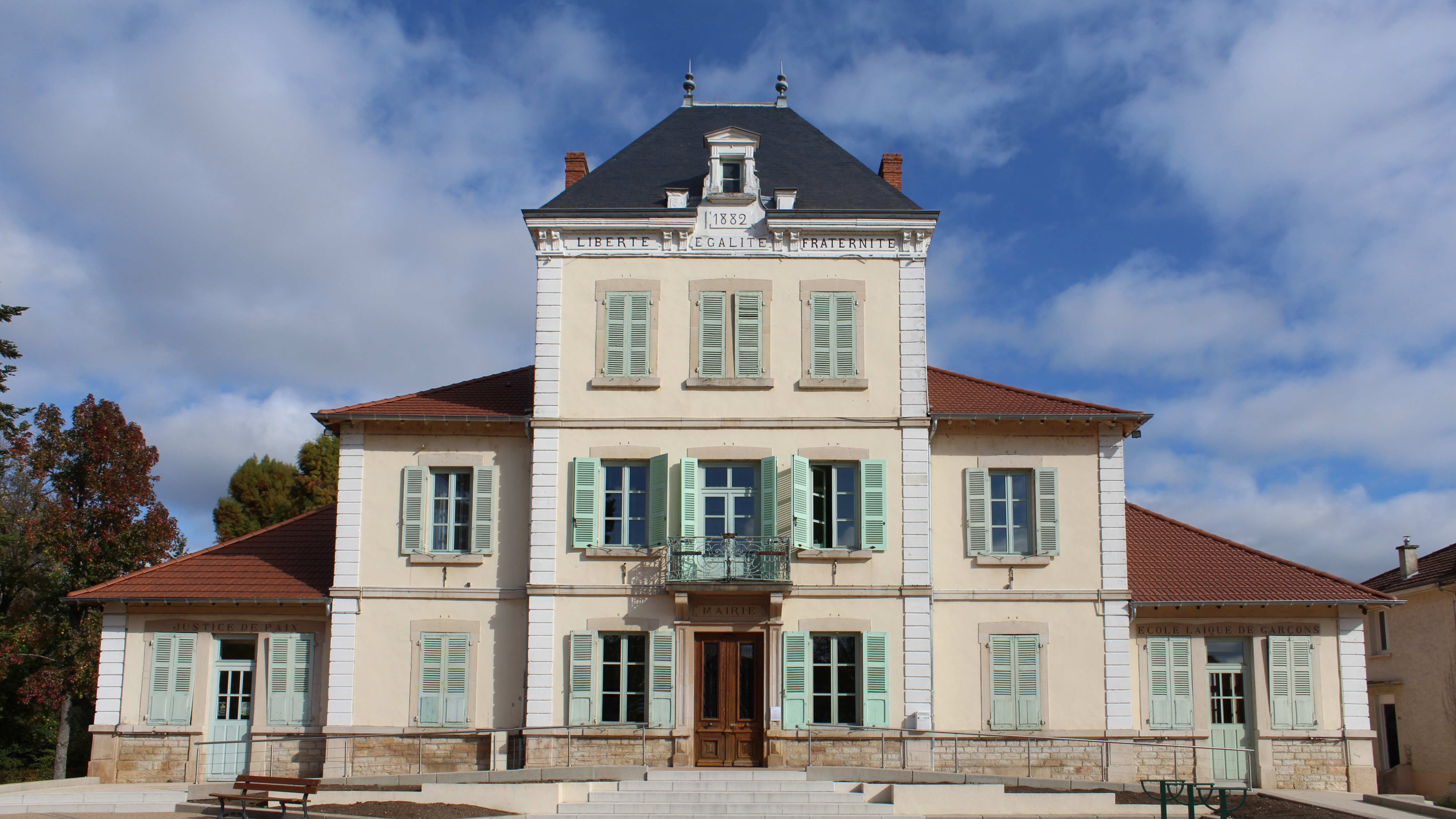 Mairie de Vonnas.